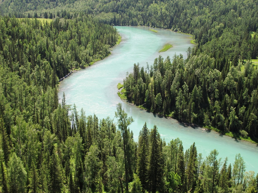 Kanas Lake. Sleeping Dragon Bay. Sleeping Dragon Bay 48.62165, 87.04832, Xinjing, China